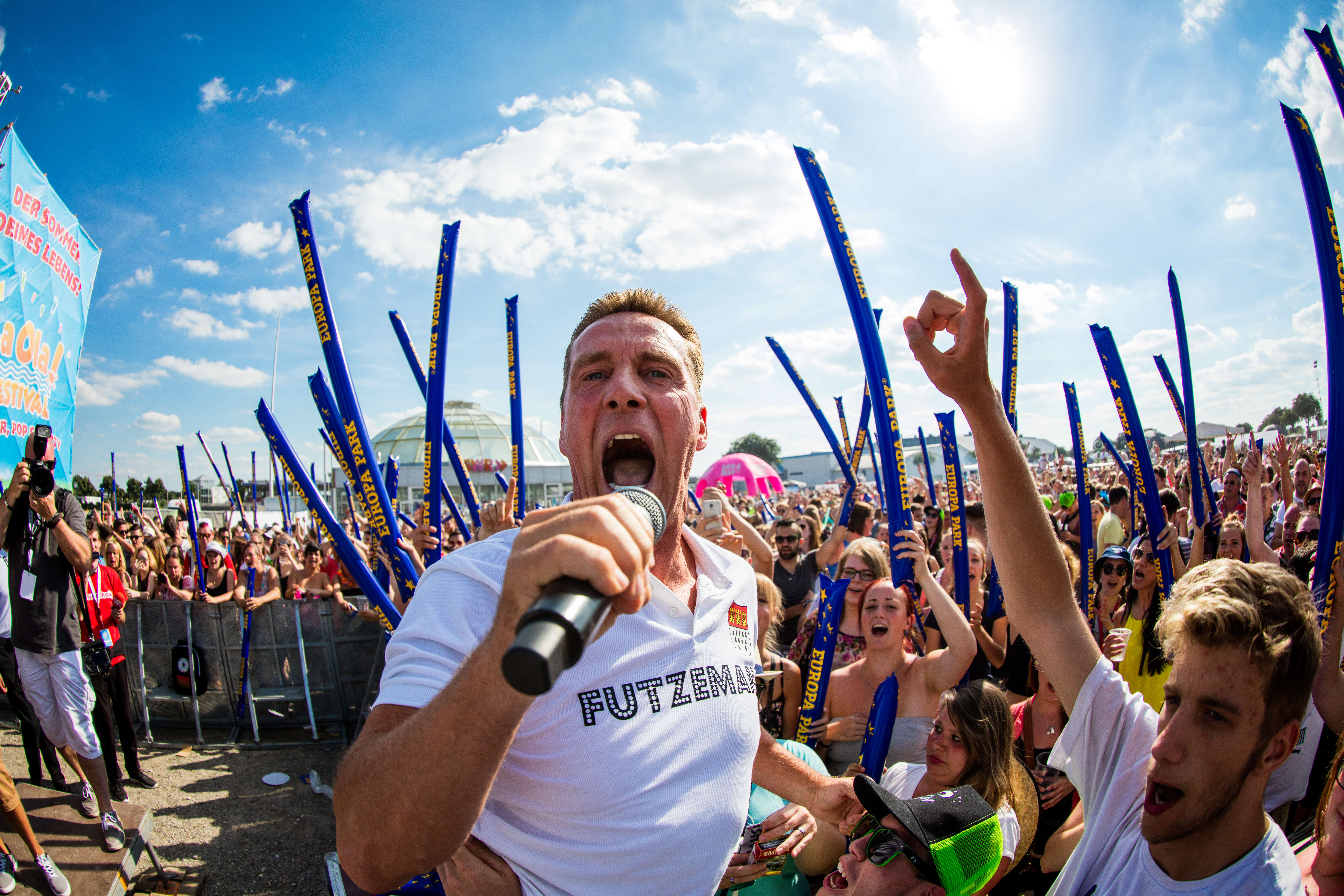 Jürgen Milski during La Ola Mannheim at Maimarktgelände, Mannheim, Baden Württemberg, Germany on 2016-07-09, Photo: Sven Mandel